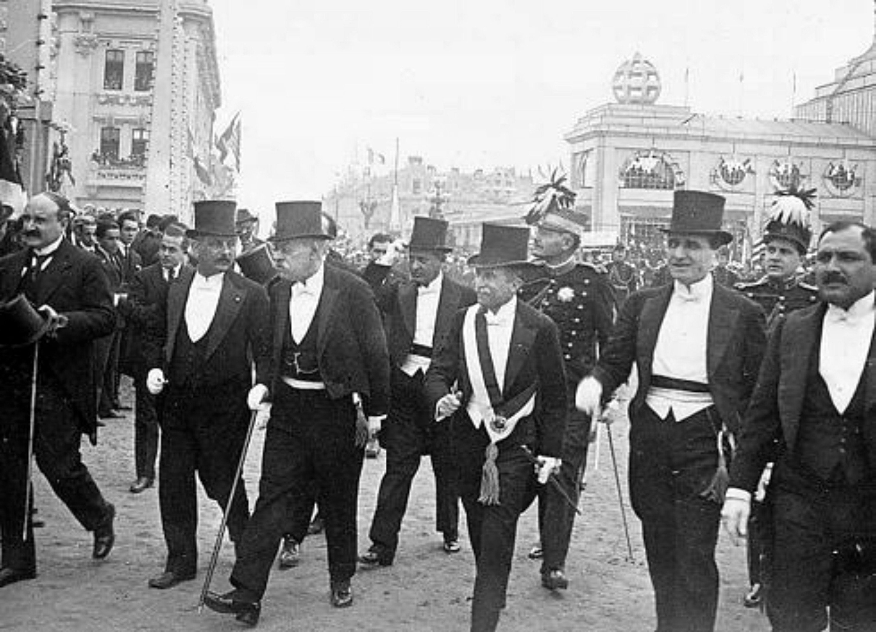 Augsto B Leguia en el Celebraciones de centenario de la Independencia del Perú (1925)